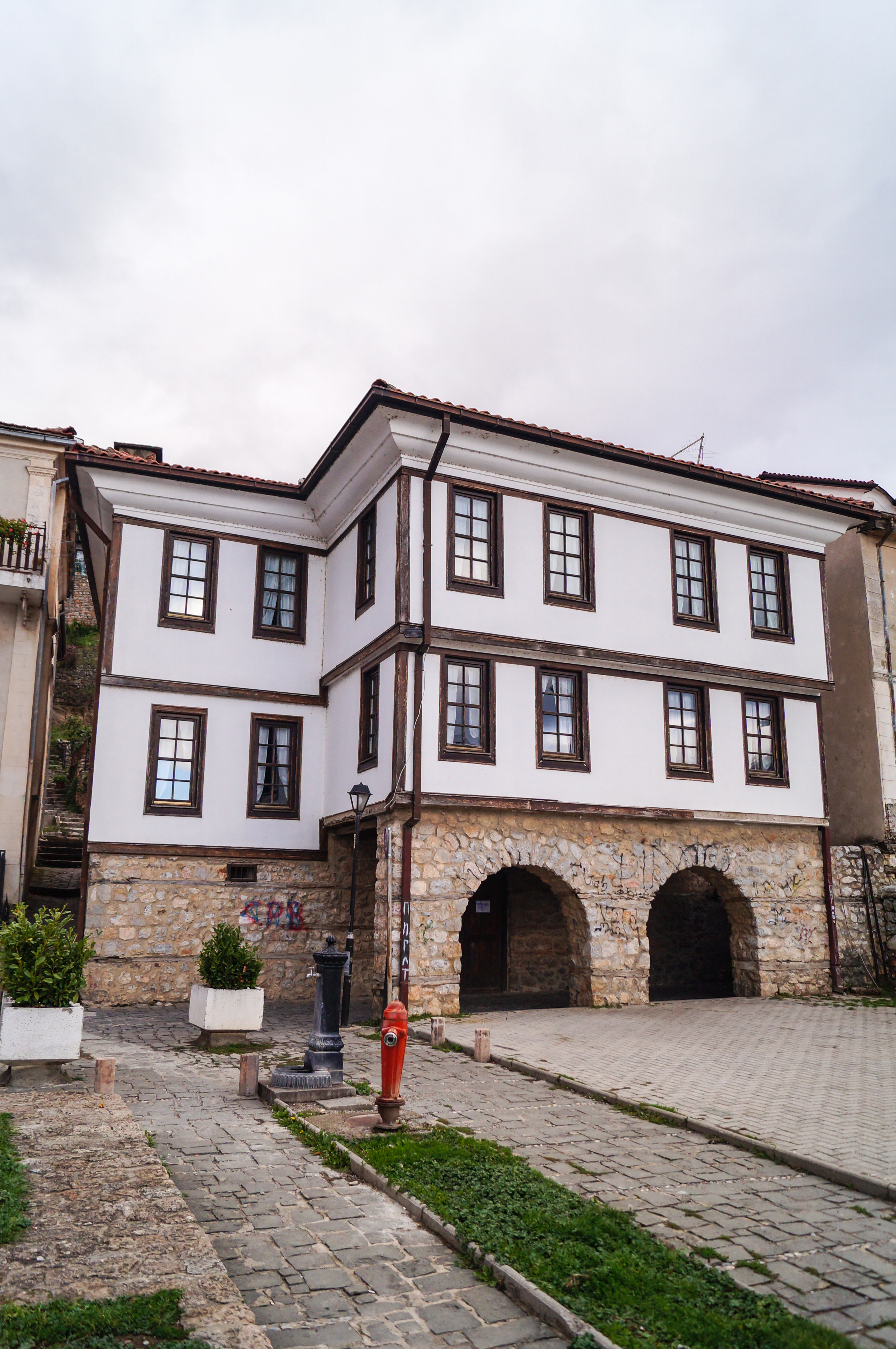 Типичен претставник на орхидската староградска архитектура, Сараиште, Охрид.